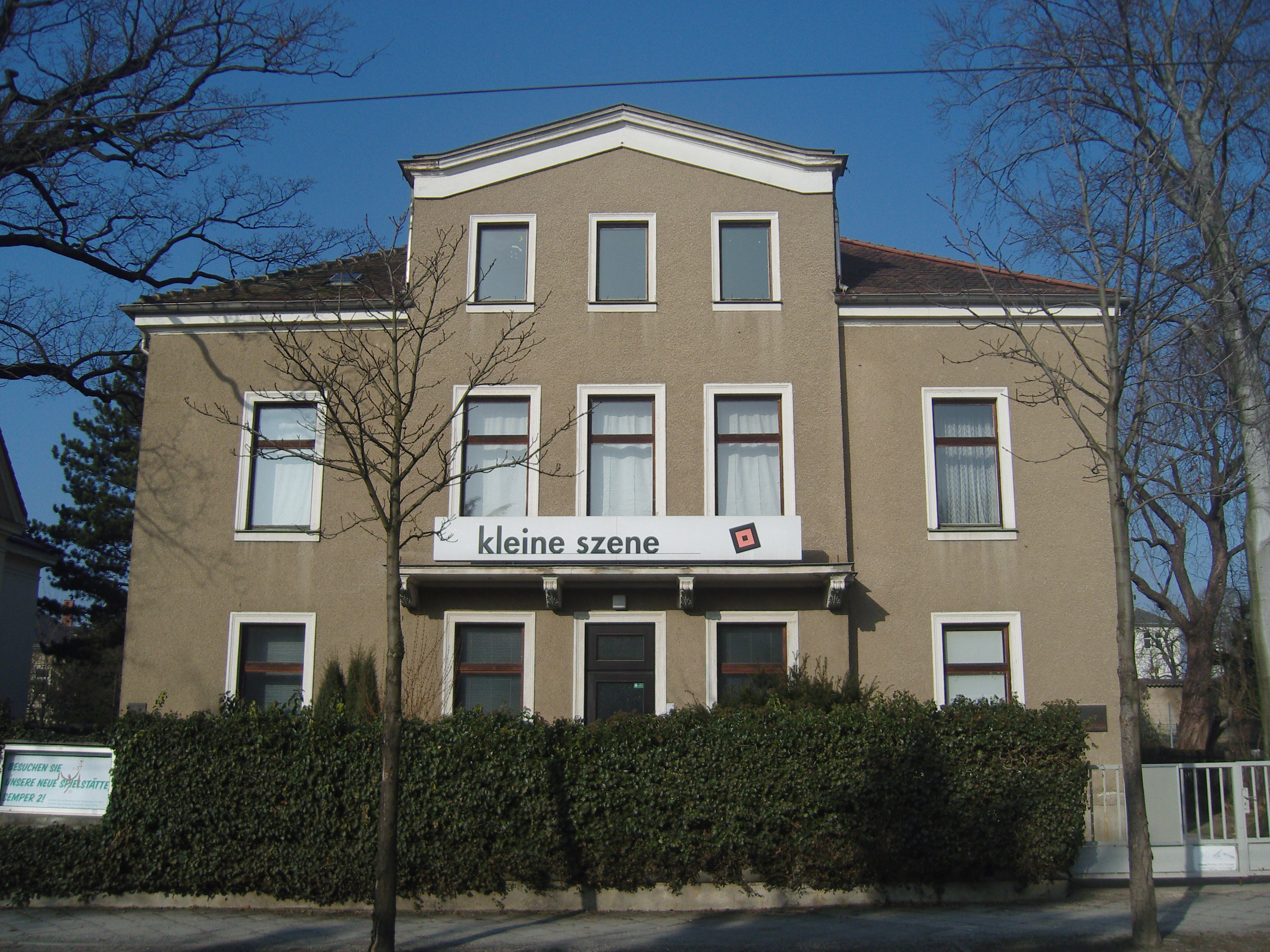 Gebäude des Theaters Kleine Szene an der Bautzner Straße in Dresden, ehemaliges Wohnhaus von Mary Wigmann